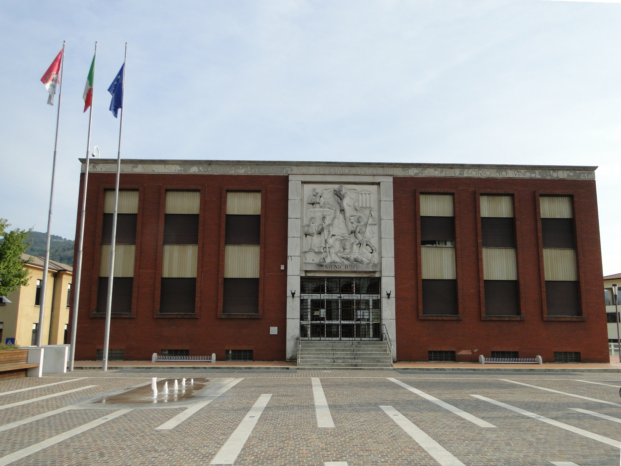 Municipio di Nembro (BG), ex casa del littorio